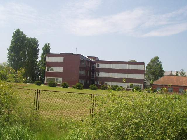 Uprava PIK-a